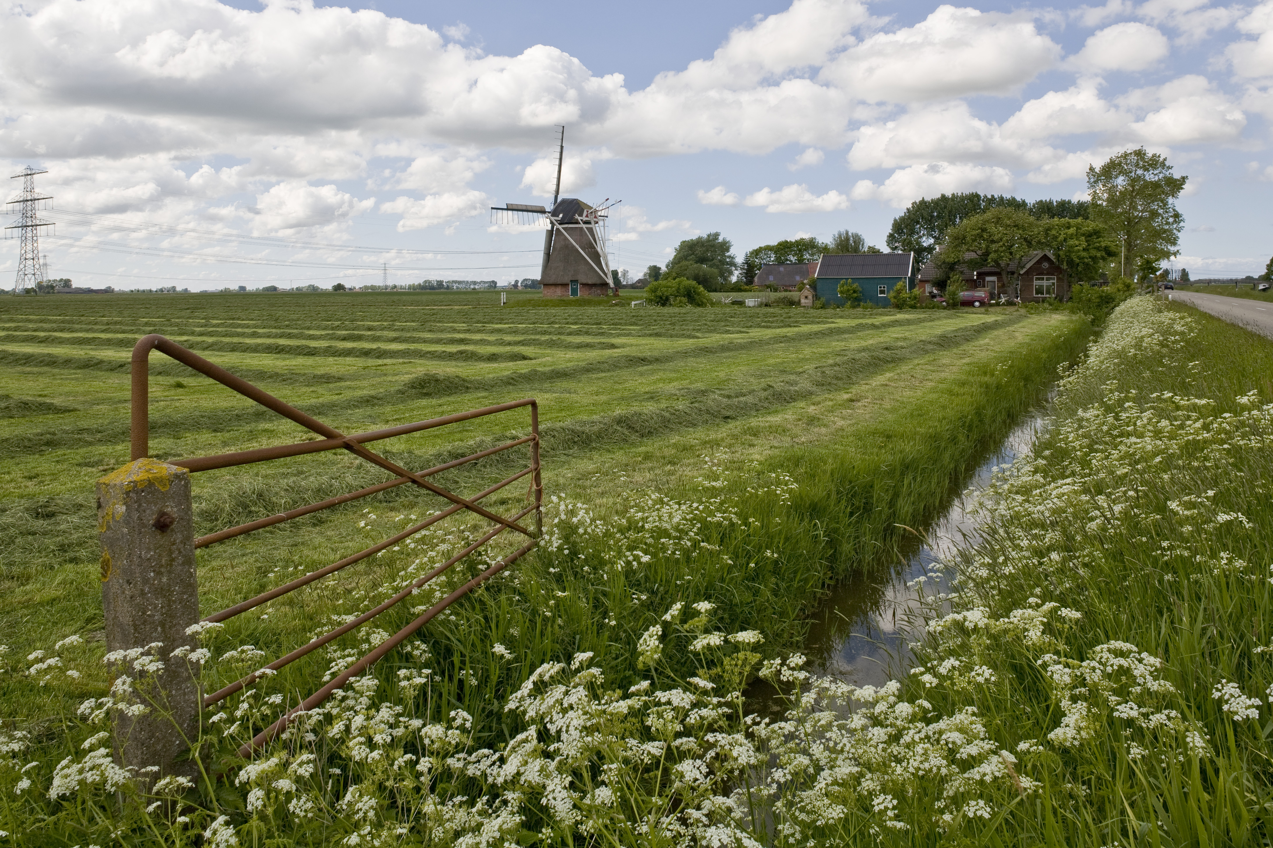 Eolus: Overzicht van de molen, gezien vanaf het weiland (opmerking: Project RRWR)